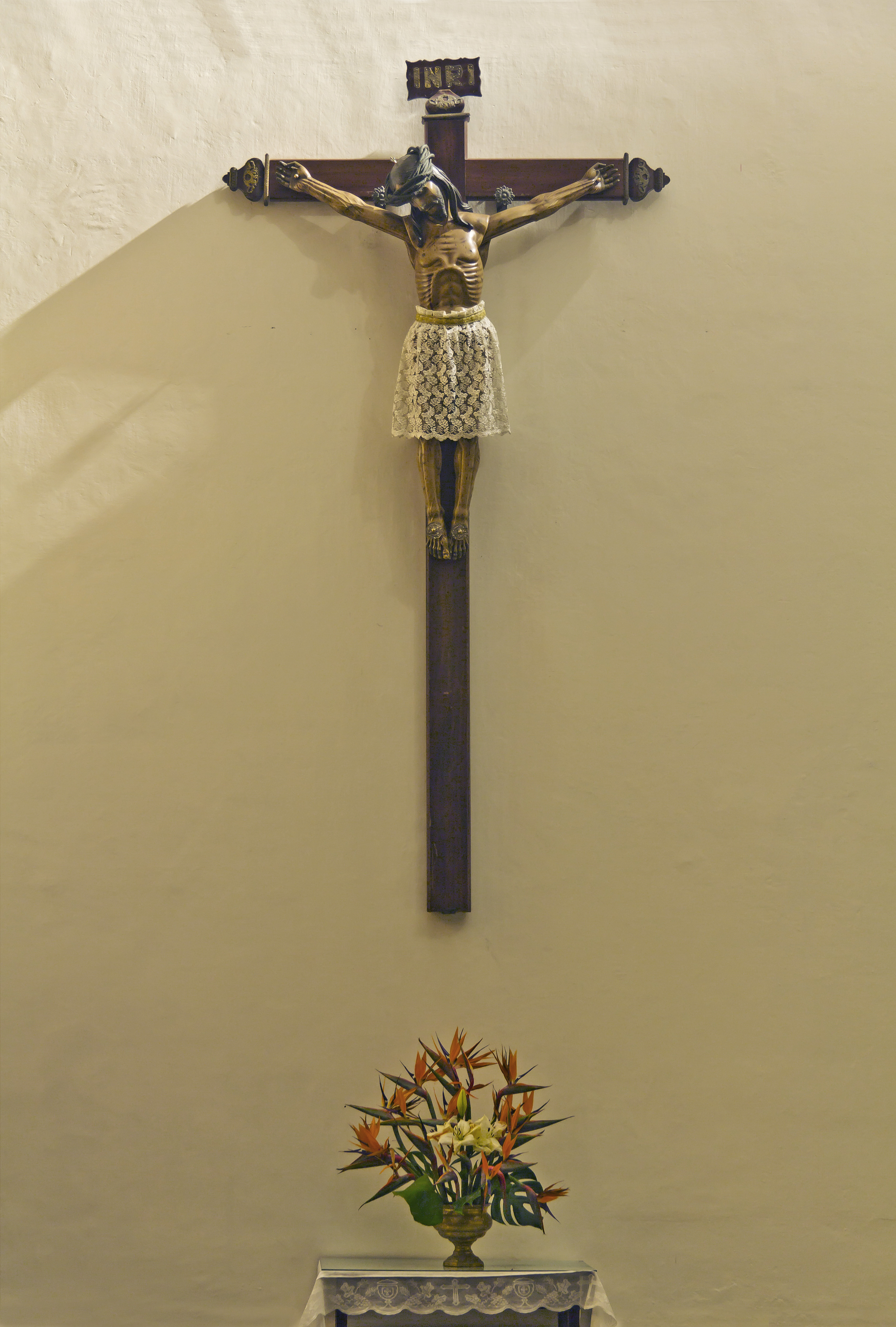 Santísimo Cristo de Burgos („Cristo de la faldita“) in einer Seitenkapelle der Kathedrale in La Laguna